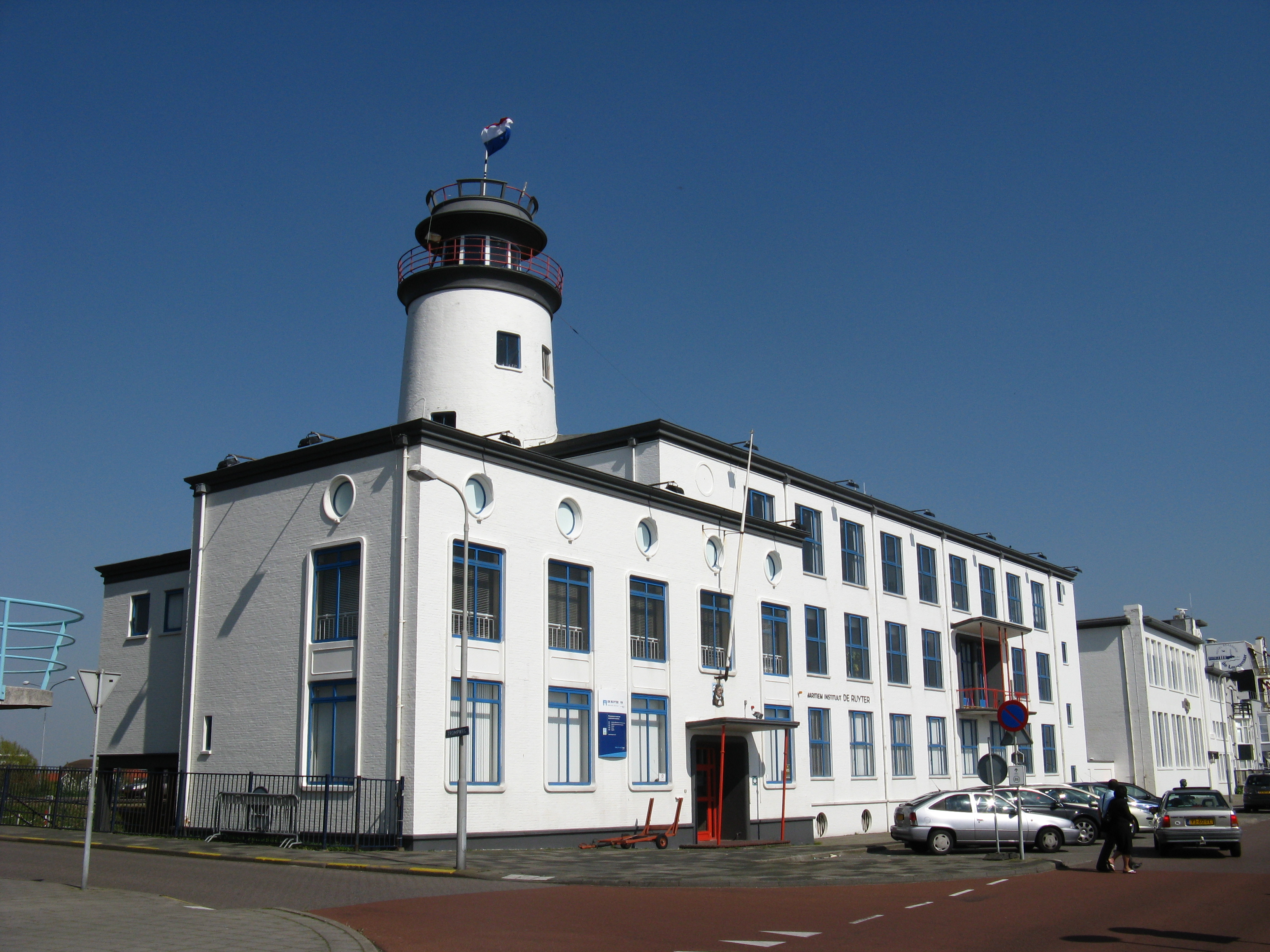 L'institut maritime de Vlissingen